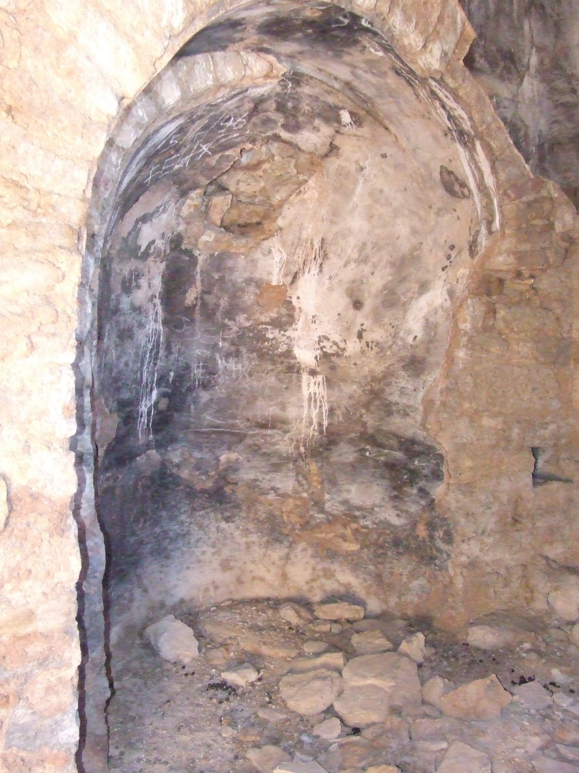 Església de Santa Anna de Montadó (Benavent de la Conca, Isona i Conca Dellà, Pallars Jussà)